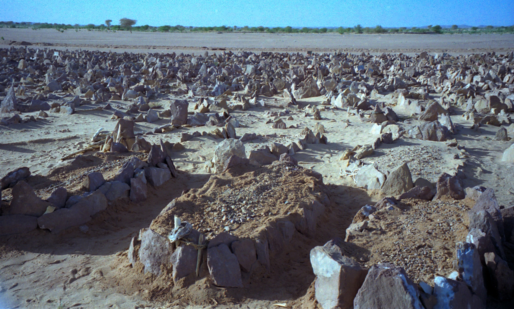 A graveyard outside of Agadez, Niger. 1997.1997 #279-4 Agadez Haruna's grave